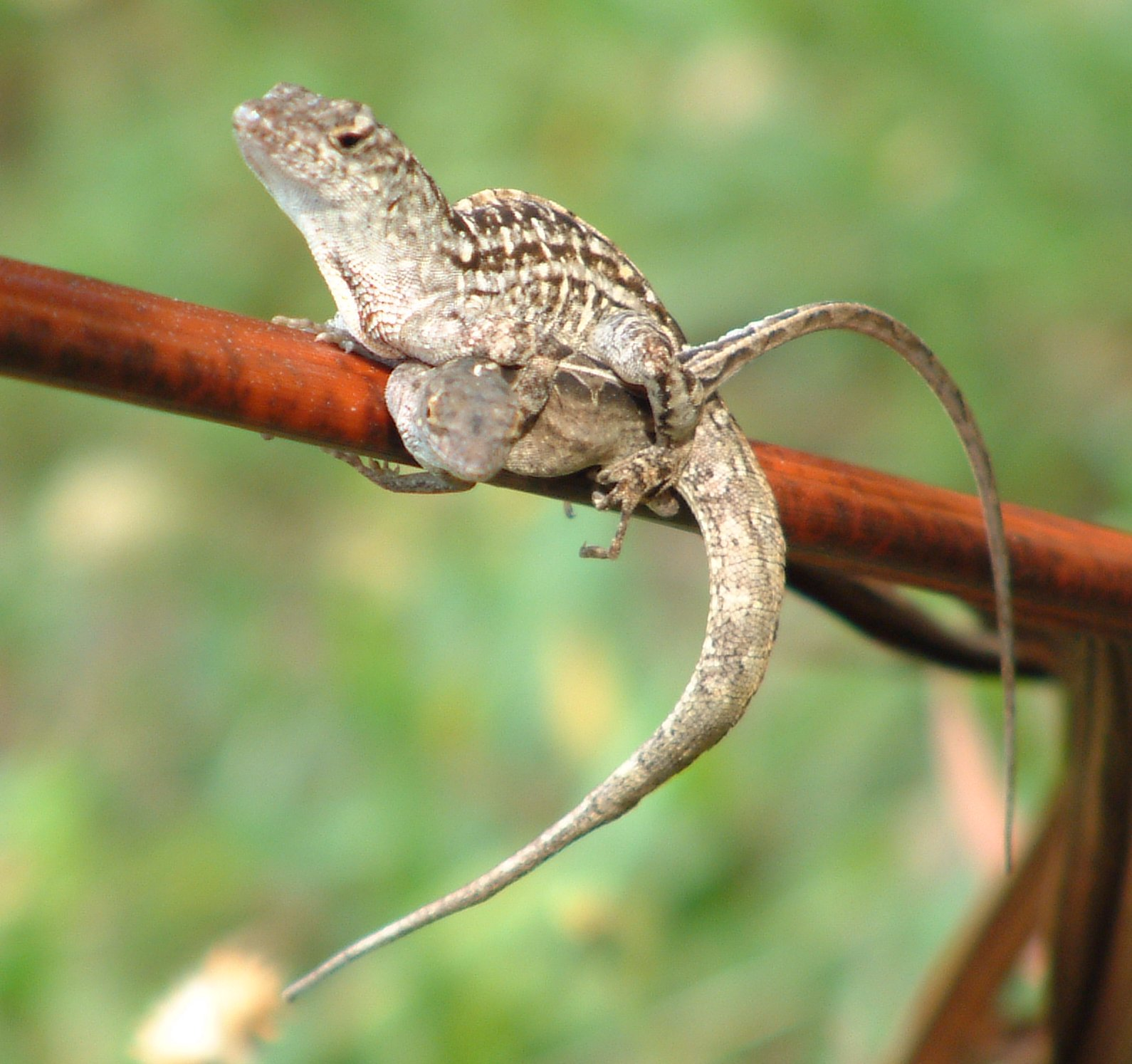 Accouplement d' Anolis sagrei. Photo personnelle.